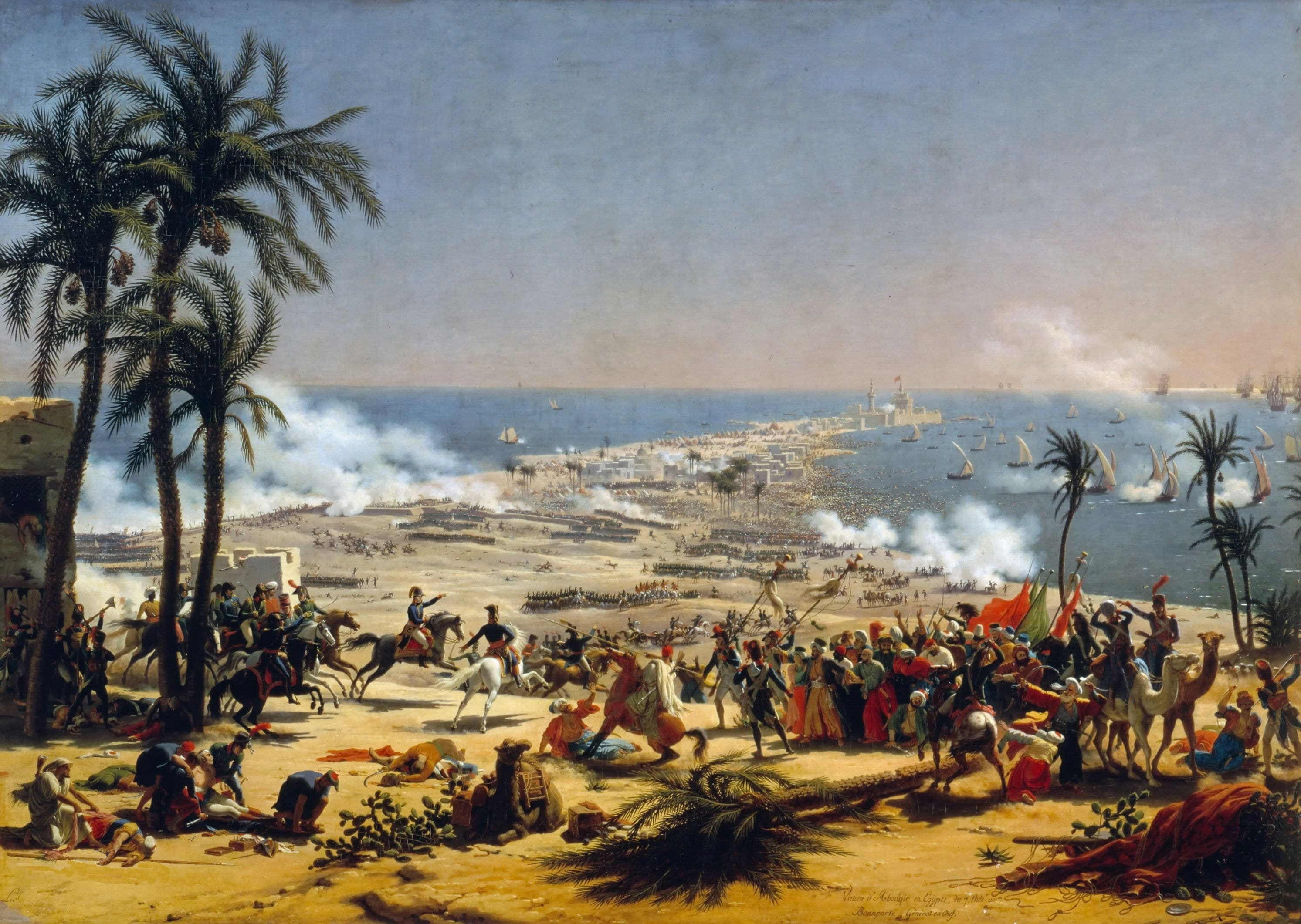 Campagne d'Egypte de Bonaparte (1798-1801). Huile sur toile, Dimensions : 185x255 cm, Référence : MV 6856.